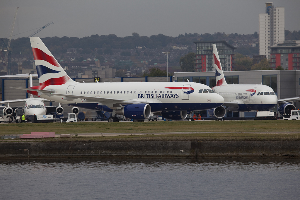 G-EUNB A318 BAW